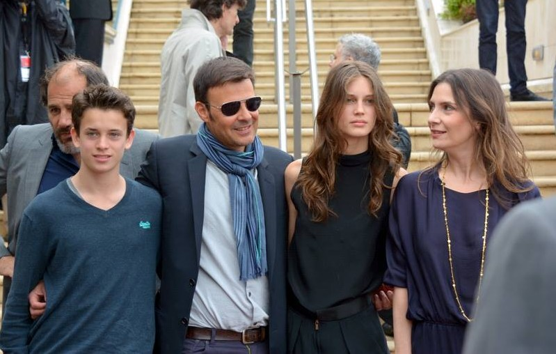 L'équipe du film "Jeune et jolie" au festival de Cannes. De gauche à droite, Frédéric Pierrot, Fantin Ravat, François Ozon, Marine Vacth, Géraldine Pailhas.